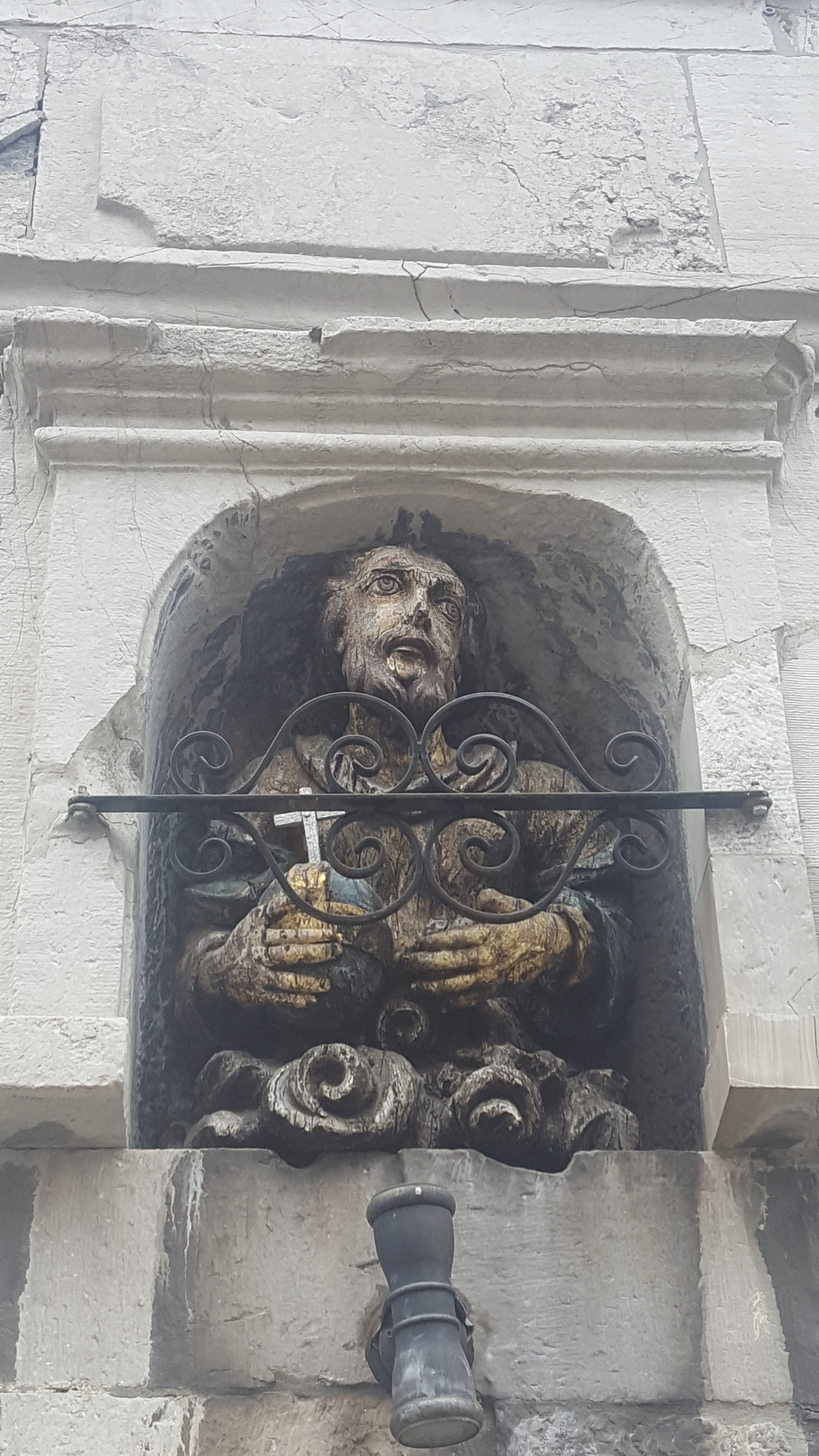 Père Eternel, rue Jardon 88, Herve, Belgique